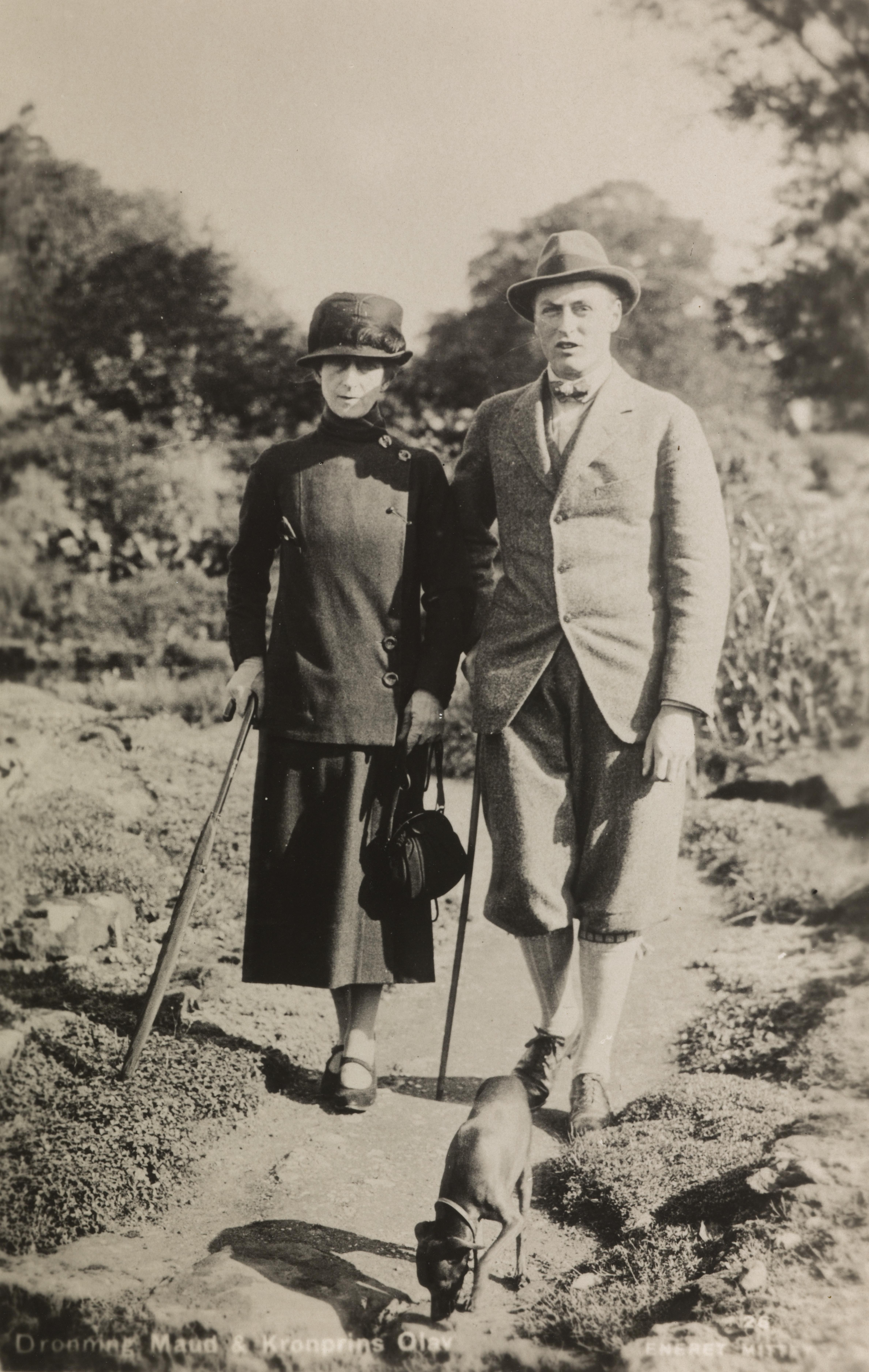 Bildet er hentet fra Nasjonalbibliotekets bildesamling. Anmerkninger til bildet var: Opptaket er sannsynligvis gjort i parken til Bygdøy kongsgård. Depicted person: Olav V konge av Norge Depicted person: Maud dronning av Norge